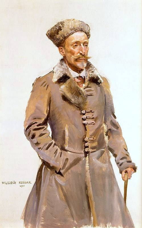 Portret arcyksięcia Karola Stefana Habsburga z Żywca